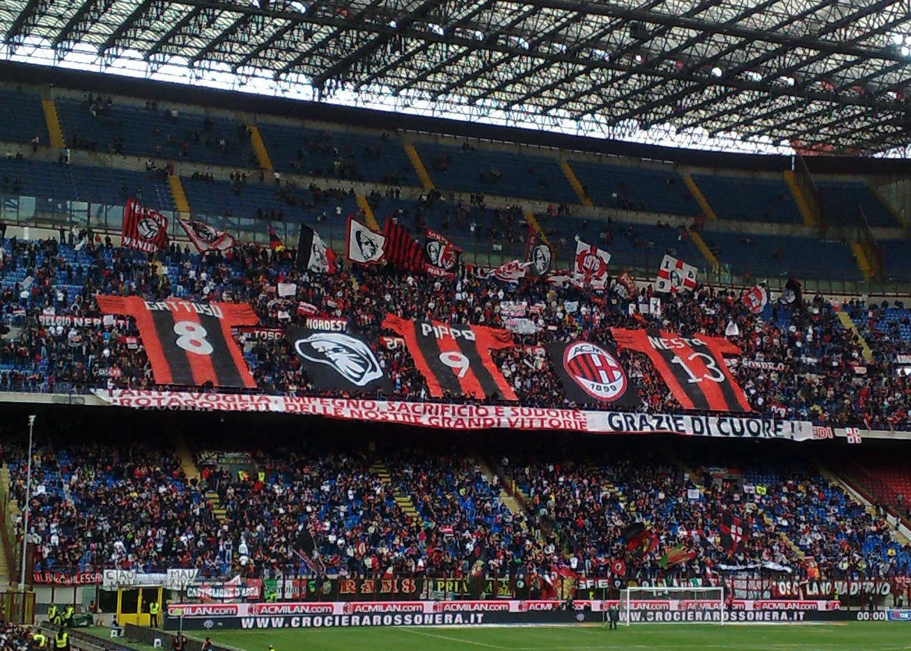 Coreografia della tifoseria dell'A.C. Milan, per celebrare l'addio alla squadra di Gennaro Gattuso, Filippo Inzaghi e Alessandro Nesta